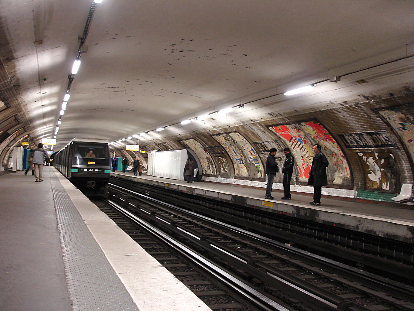 La station Les Sablons de la ligne 1 du métro de Paris en cours de décarrossage, France